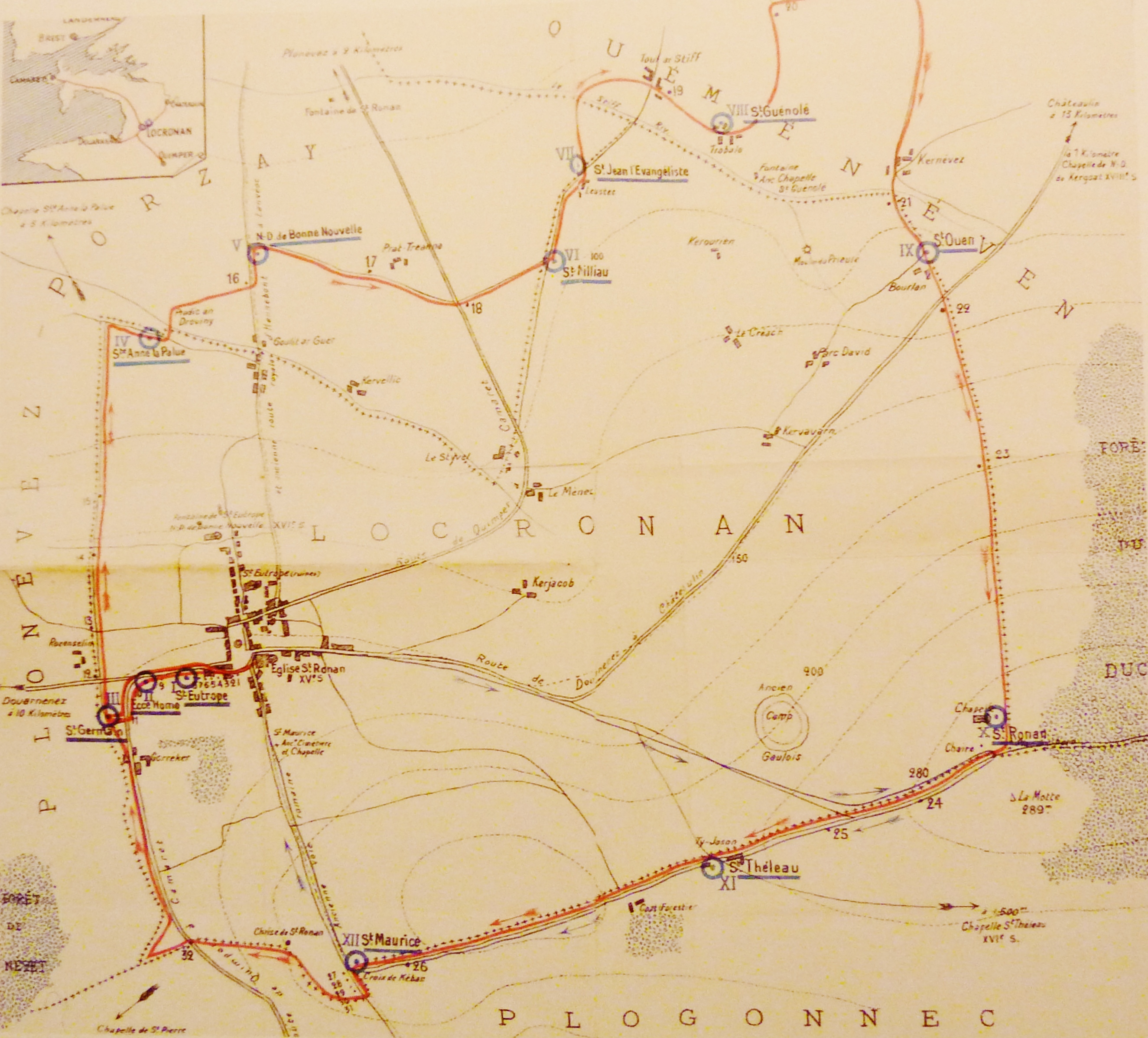 Carte du parcours de la Troménie de Locronan datant de 1923 (par l'abbé Ronan Guéguen, librairie Le Goaziou, Quimper)